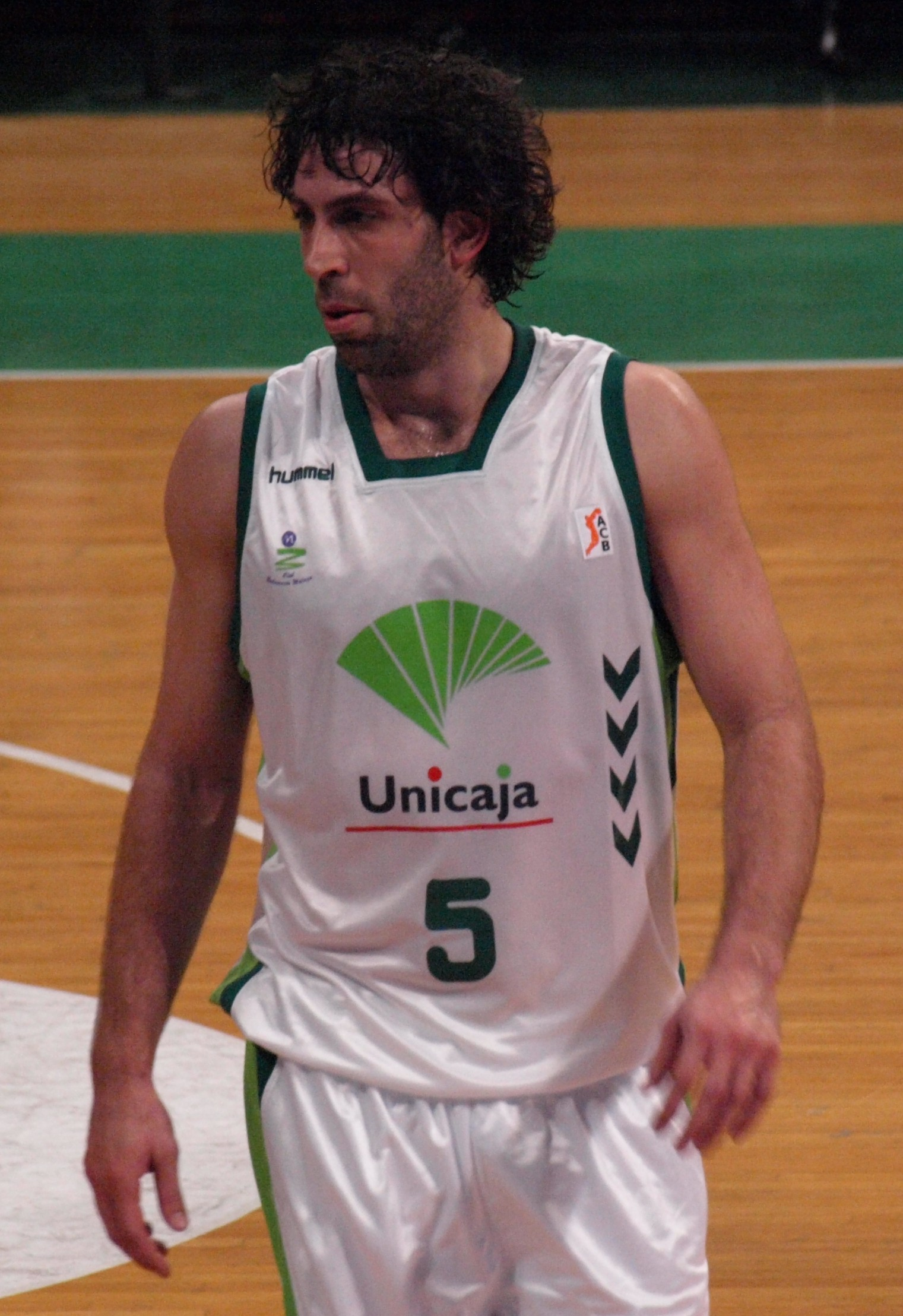 Berni Rodríguez en el partido que enfrentó al al Unicaja Málaga y al DKV Joventut de liga ACB en el Olímpico de Badalona en febrero de 2009.